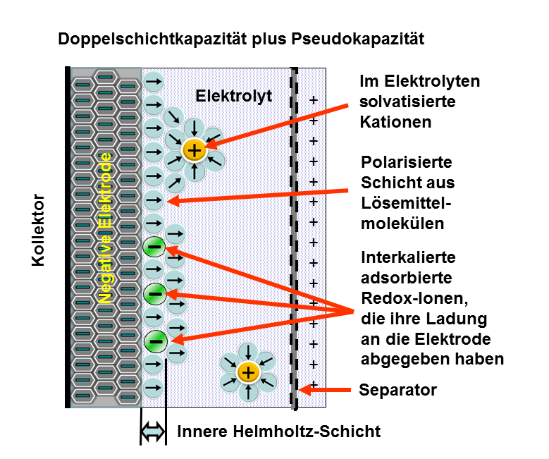 Prinzipdarstellung der Entstehung einer Pseudokapazität